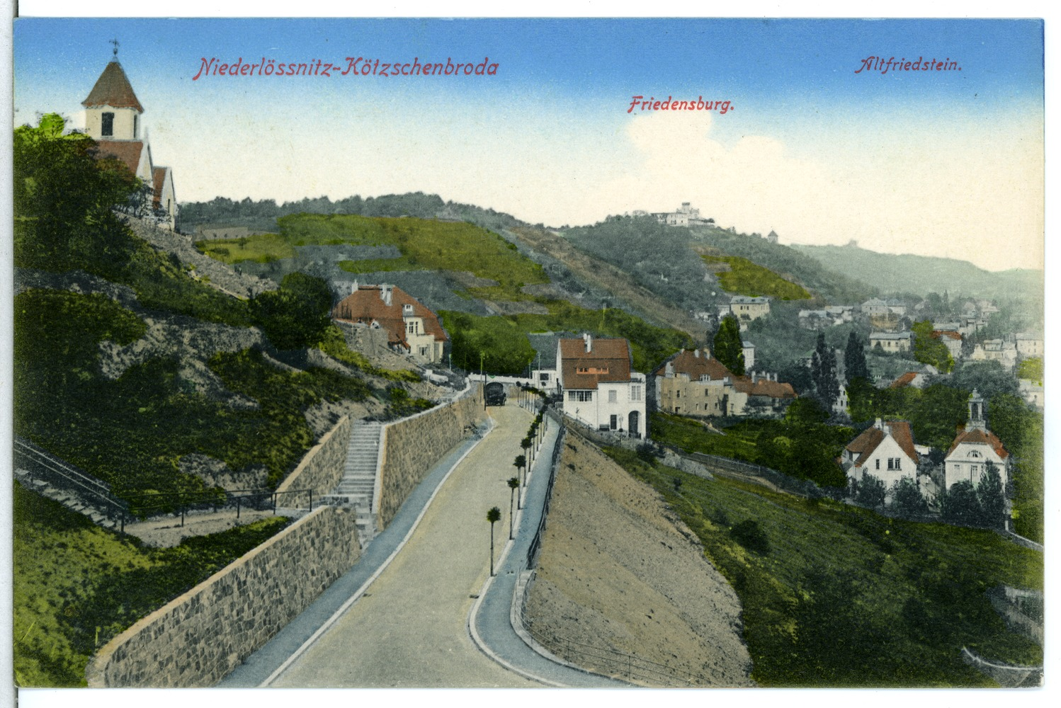 Radebeul; Niederlößnitz-Kötzschenbroda This postcard is from publisher Brück & Sohn in Meißen ( postcard has a unique number 13275 and is available in a higher resolution at the publisher. This images was uploaded in a cooperation project between Wikipedians and the publisher.